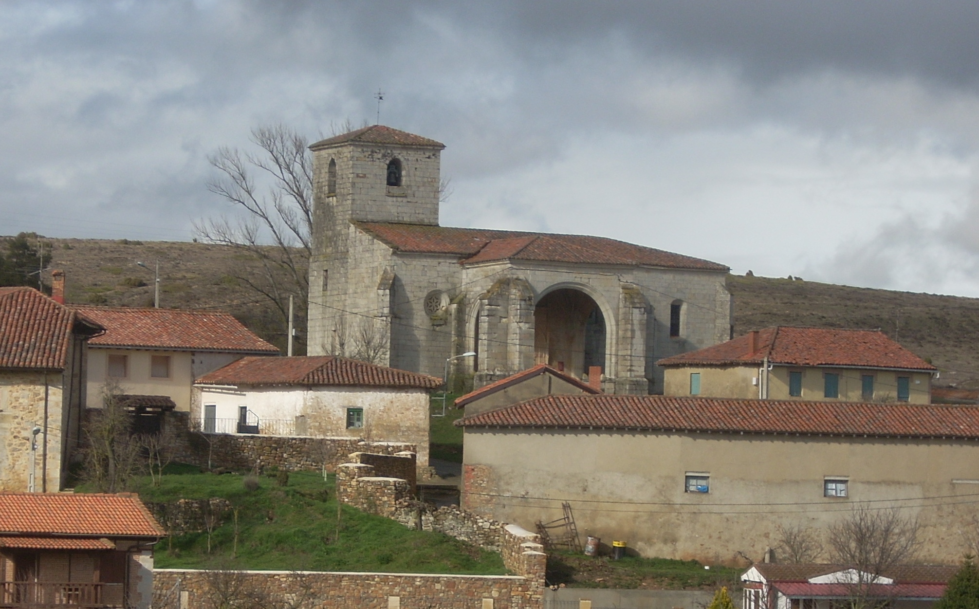 Iglesia de san Fructuoso mártir, en Colmenares, Palencia, España.